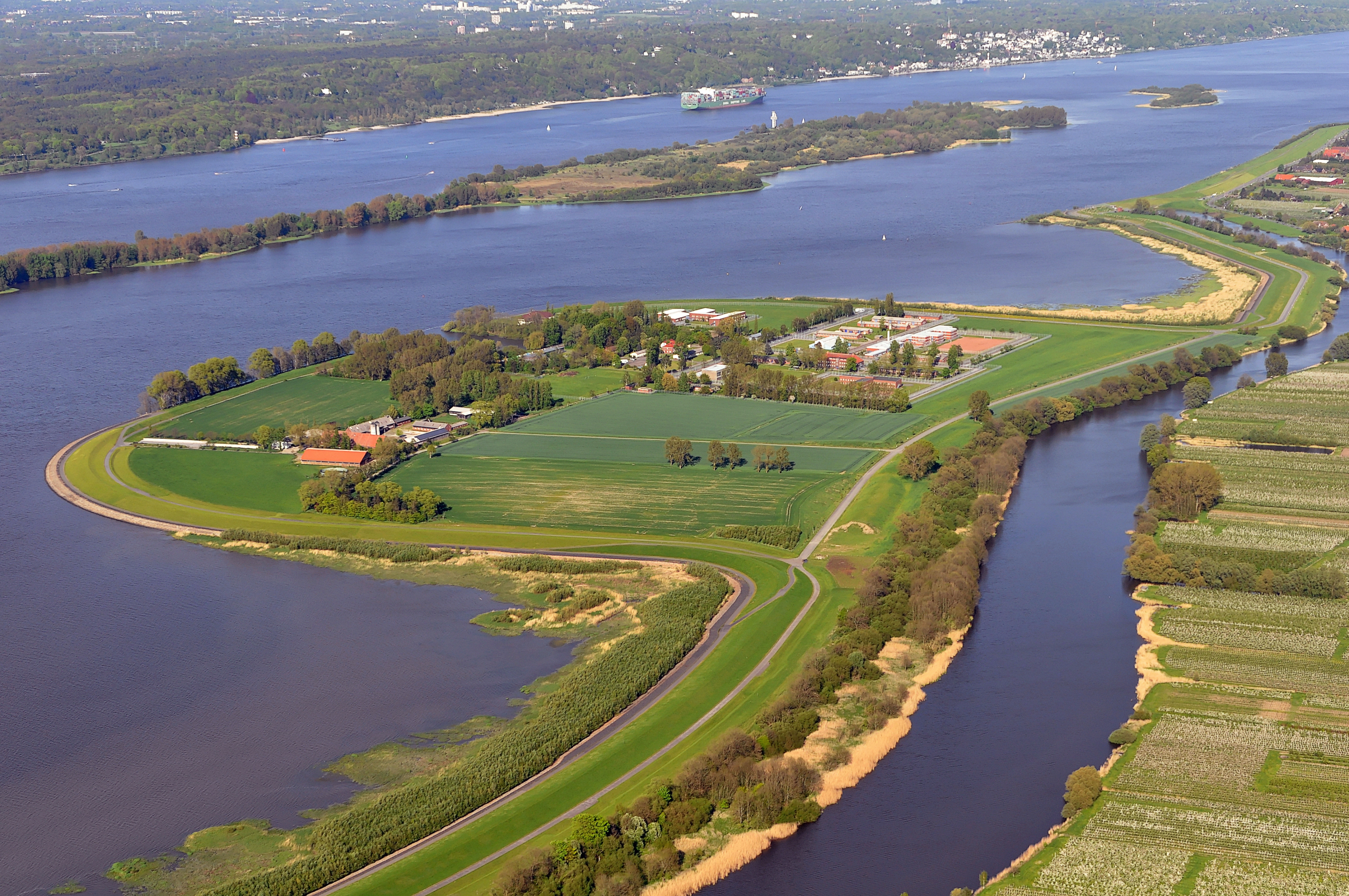 Luftbilder von der Nordseeküste 2012-05